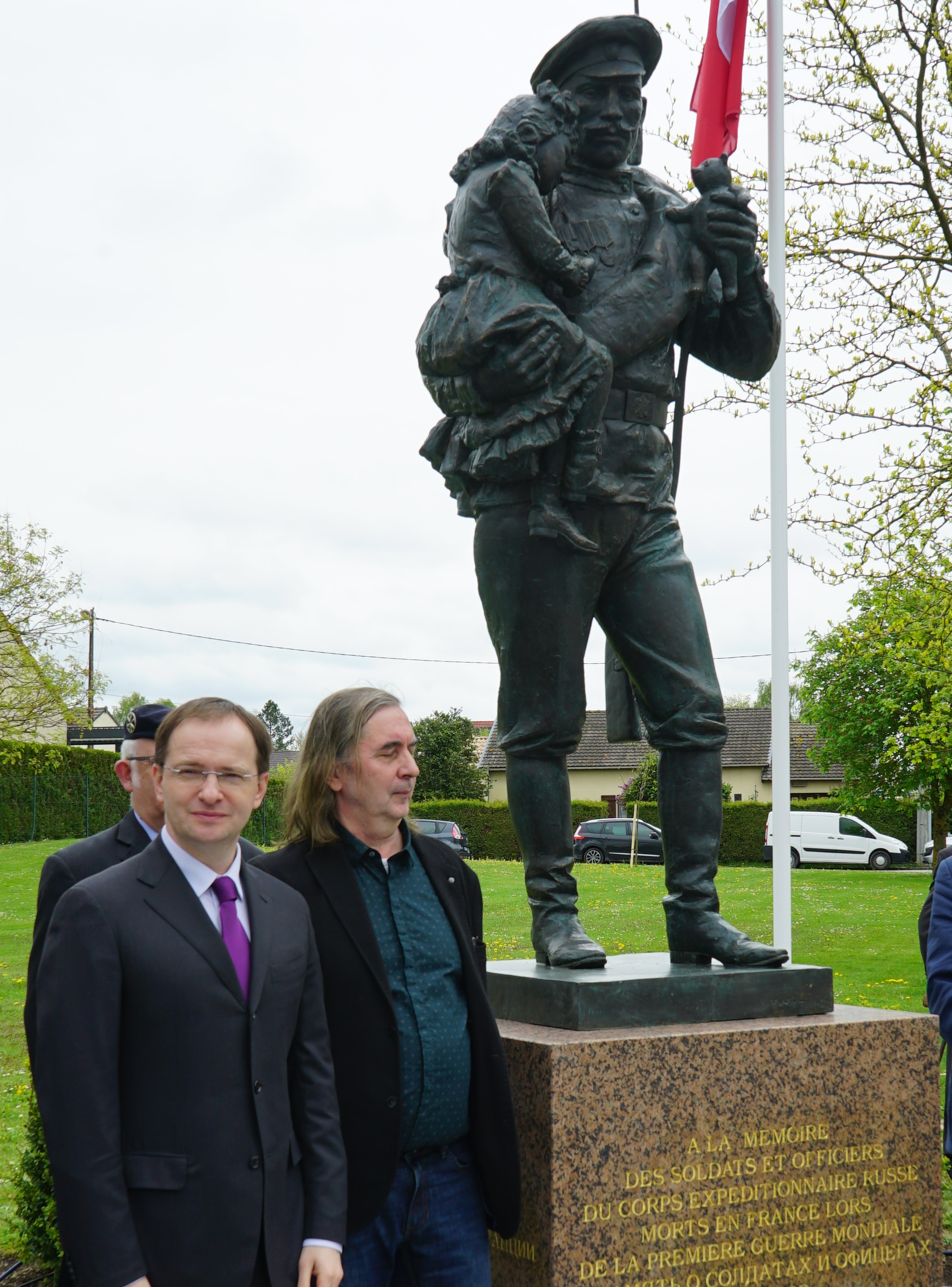 lors du visite en France de Vladimir Medinski en avril 2015.